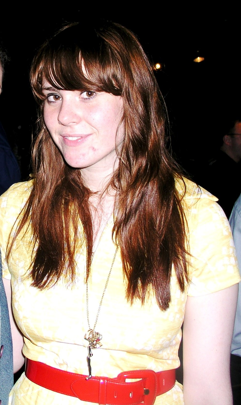 Kate Nash